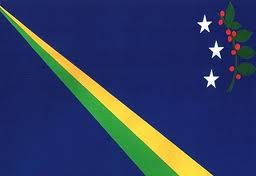 Bandera de Los Salias